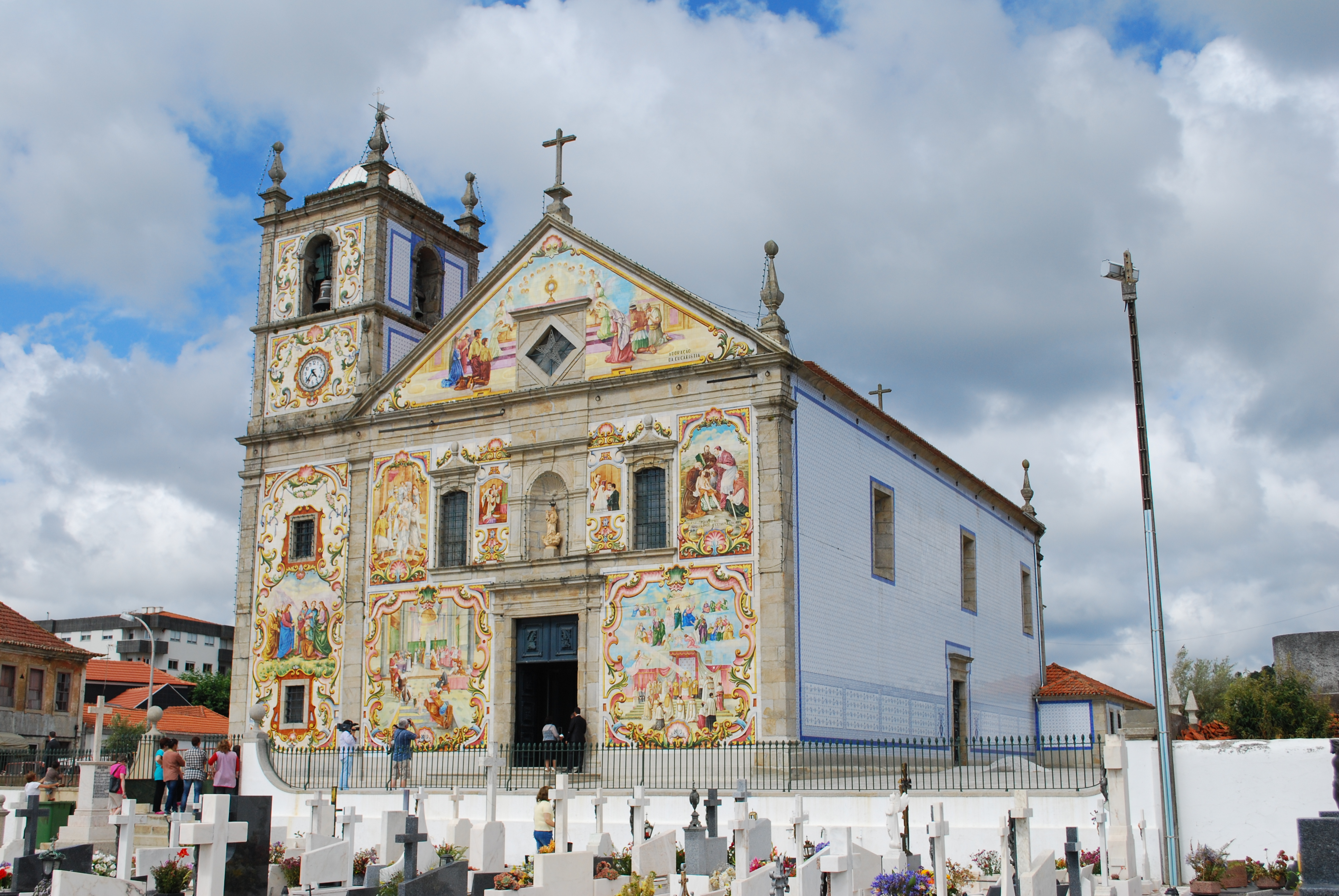 Igreja Paroquial de Válega / Igreja de Nossa Senhora do Amparo, concelho de Ovar, distrito de Aveiro, Portugal. This file was uploaded for Wiki Loves Monuments in Portugal with the unique identifier 97010810.